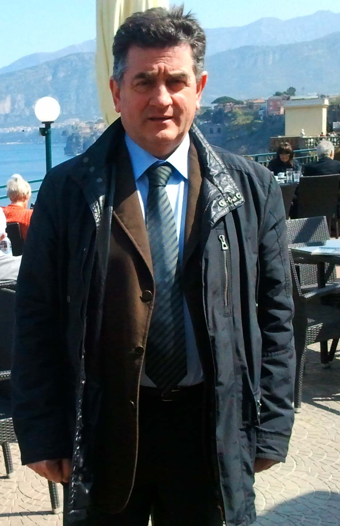 Mario Tosti